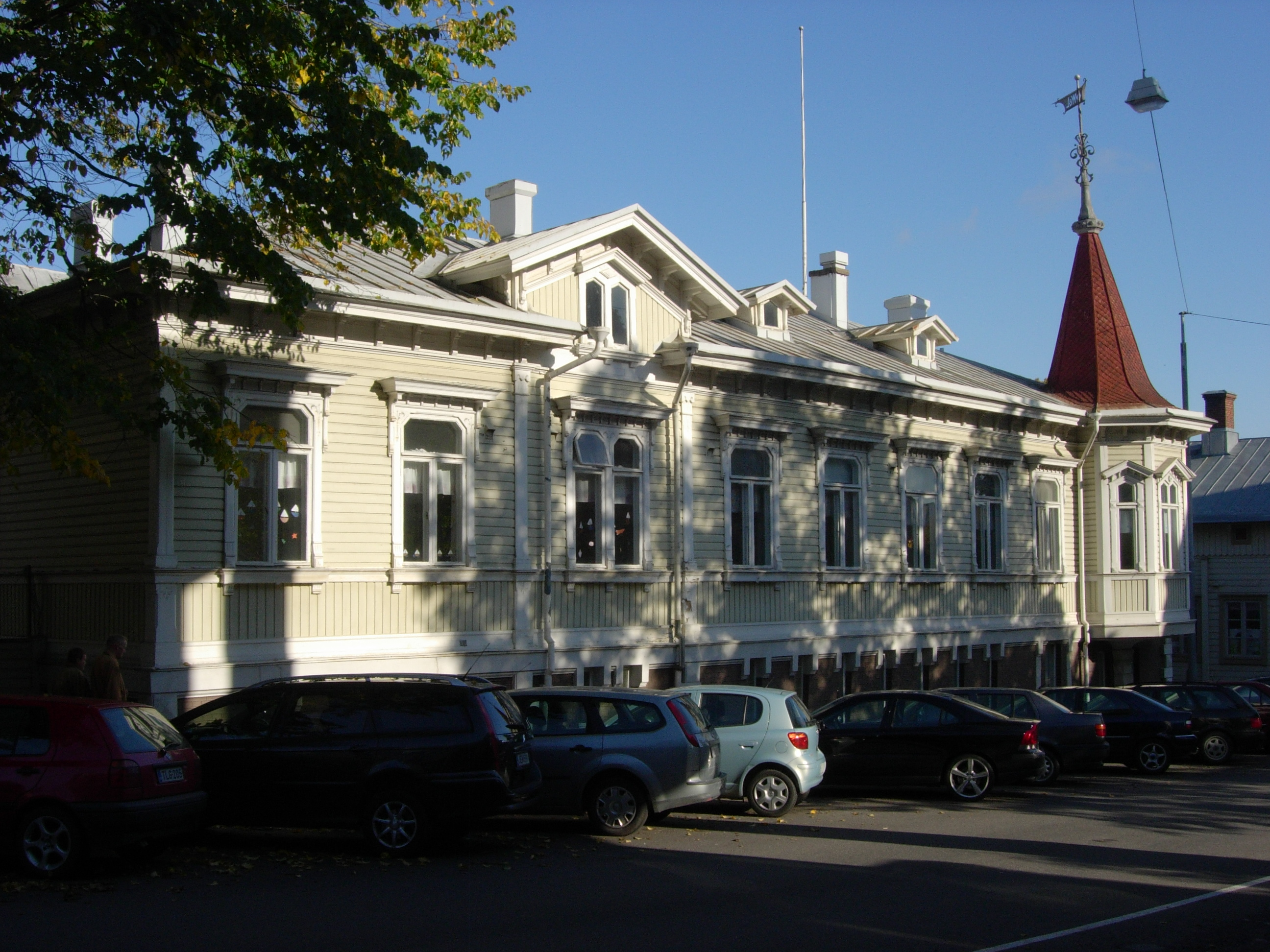 Anton Salvianderin suunnittelema jugendin siirtymävaiheern rakennus Sairashuoneenkatu 1:ssä, Turussa. Rakennuksessa nykyään ruotsinkielinen päiväkoti.